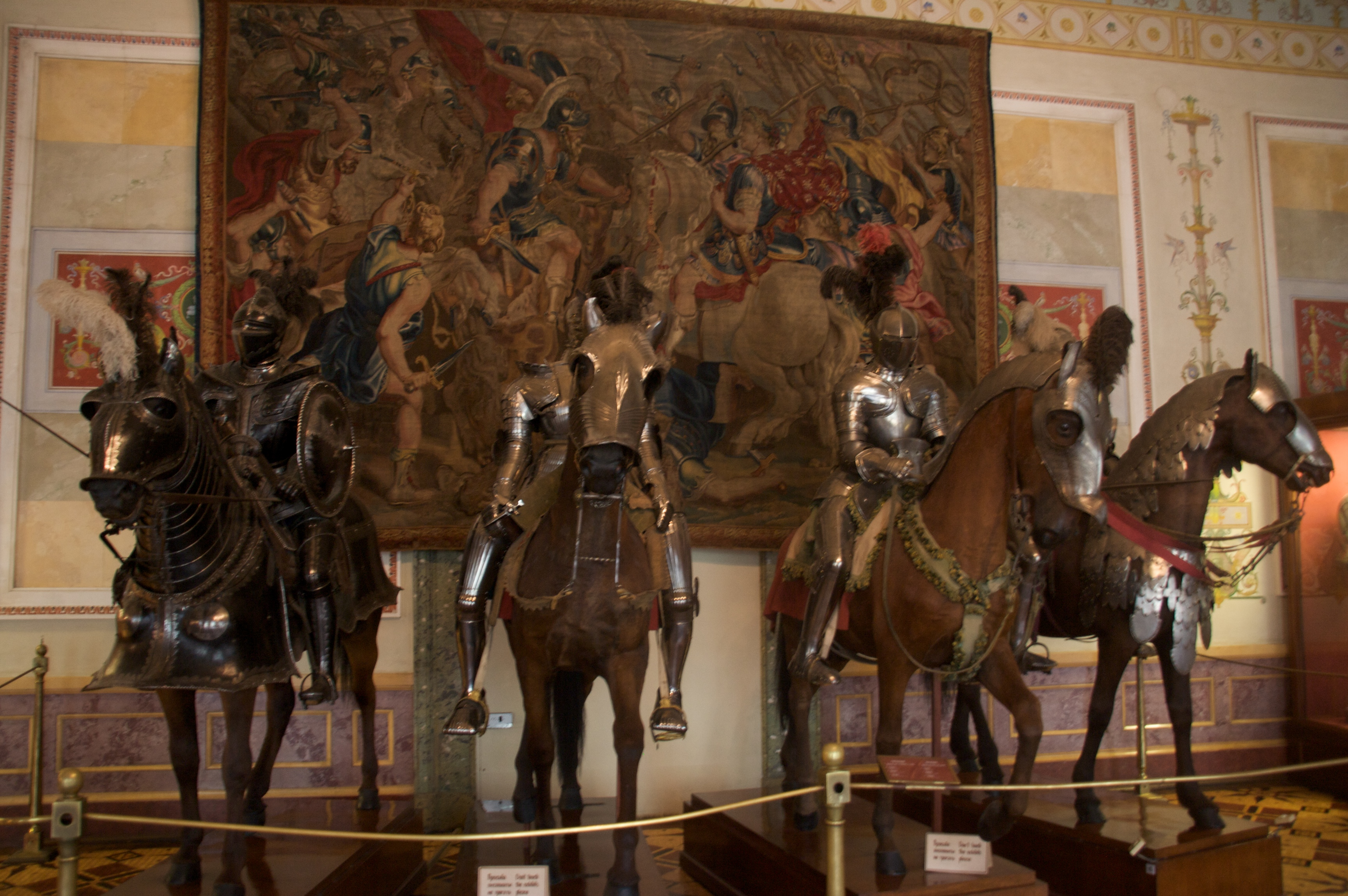 Knights' Hall, Hermitage Museum